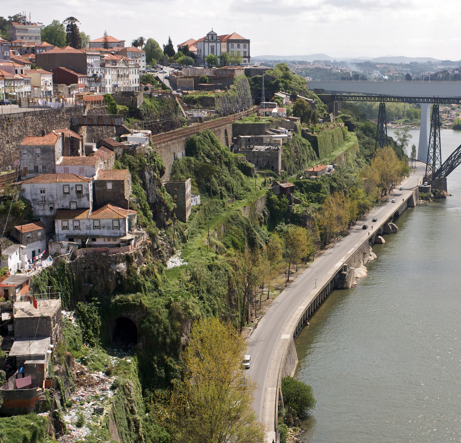 Via férrea: Ramal de Alfândega [PK 1] Local: Fontainhas (Porto) Data e hora: 24 de Abril de 2010 [12h06] Sentido: Porto • Campanhã